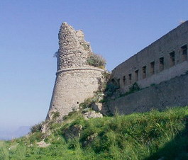 Vista Laterale di Torre Cavallo